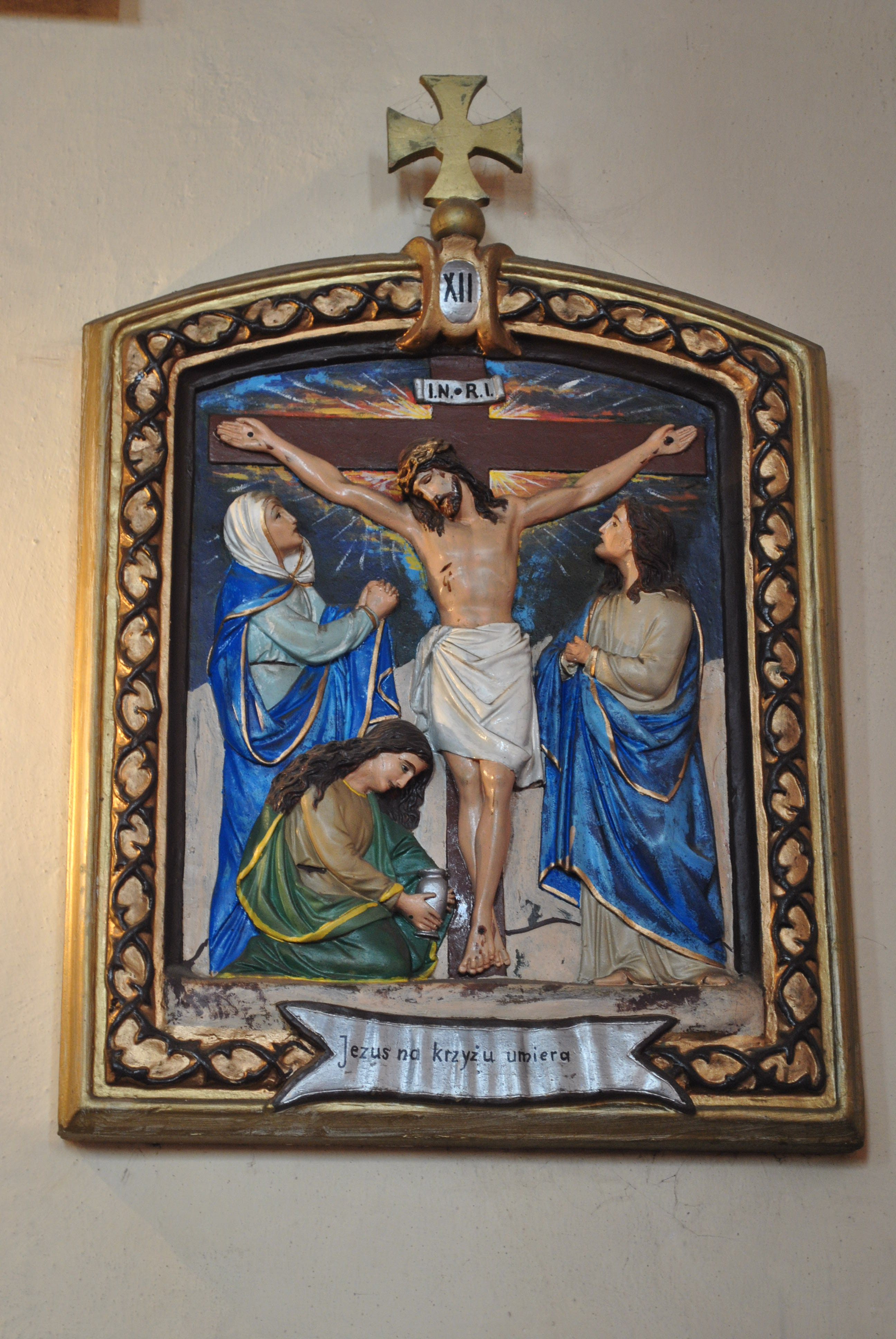 Szydłowo kościół